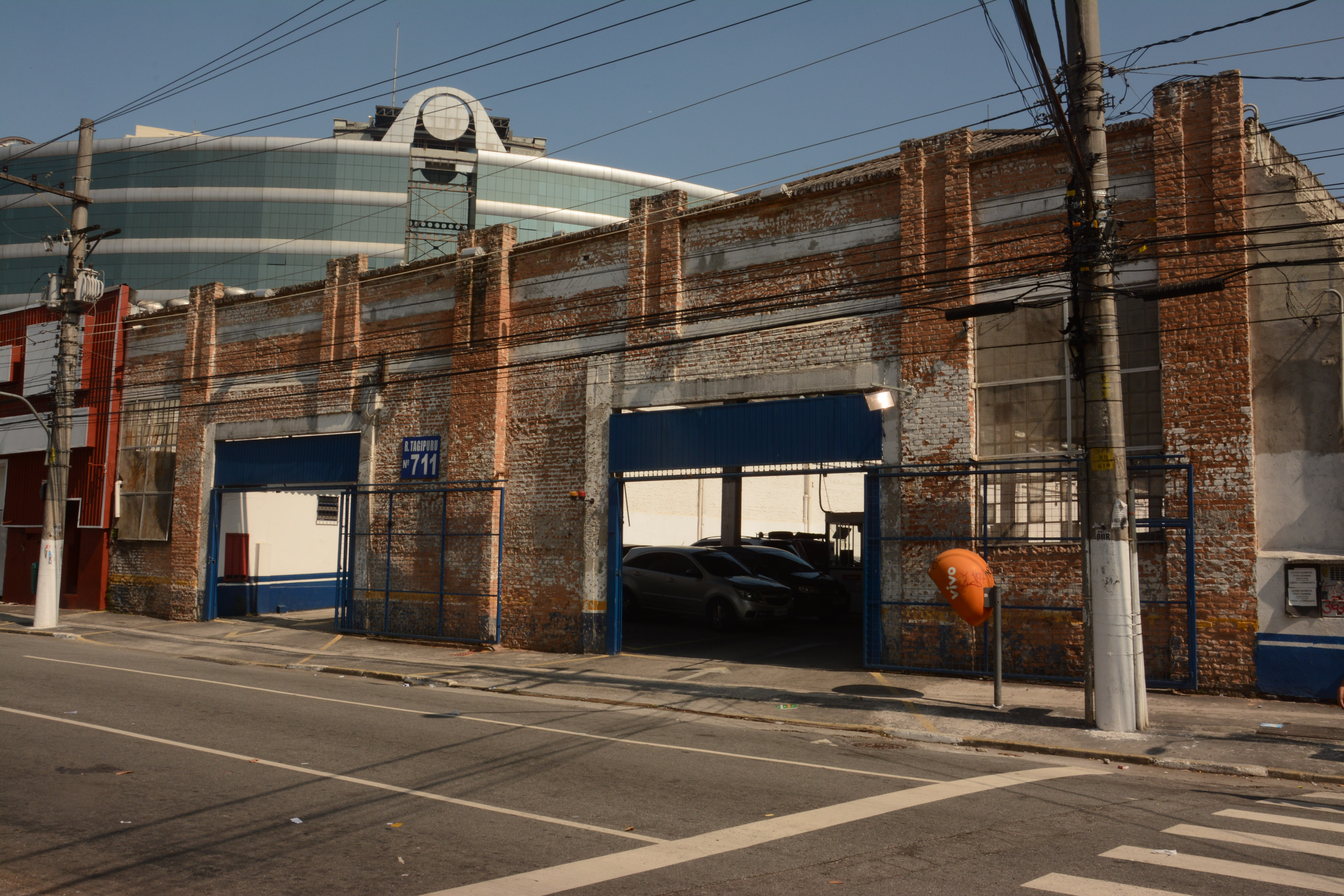 Fachada estacionamento antiga fábrica (Barra Funda - São Paulo - SP